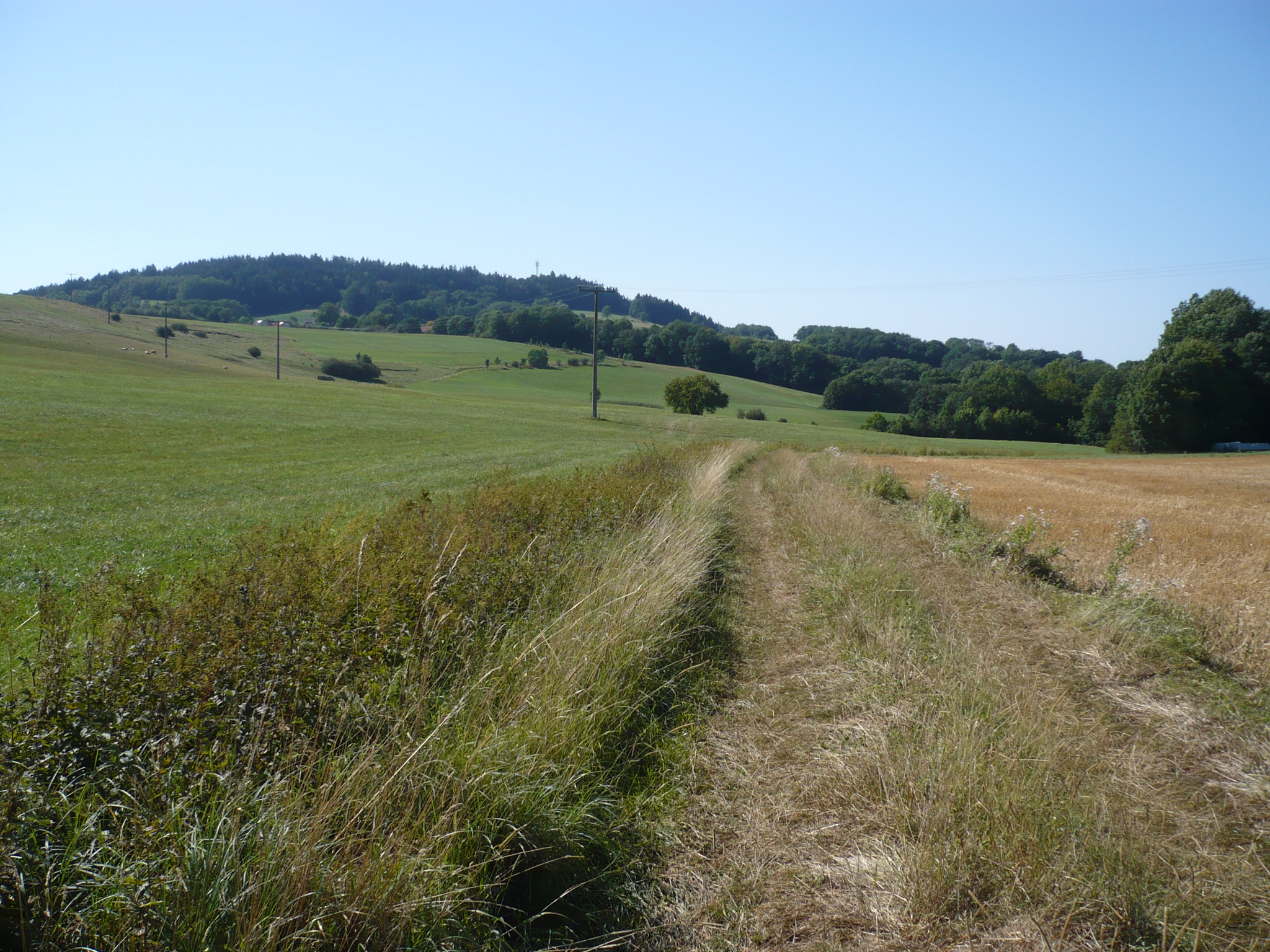 Sophienberg von Unterschreez aus gesehen